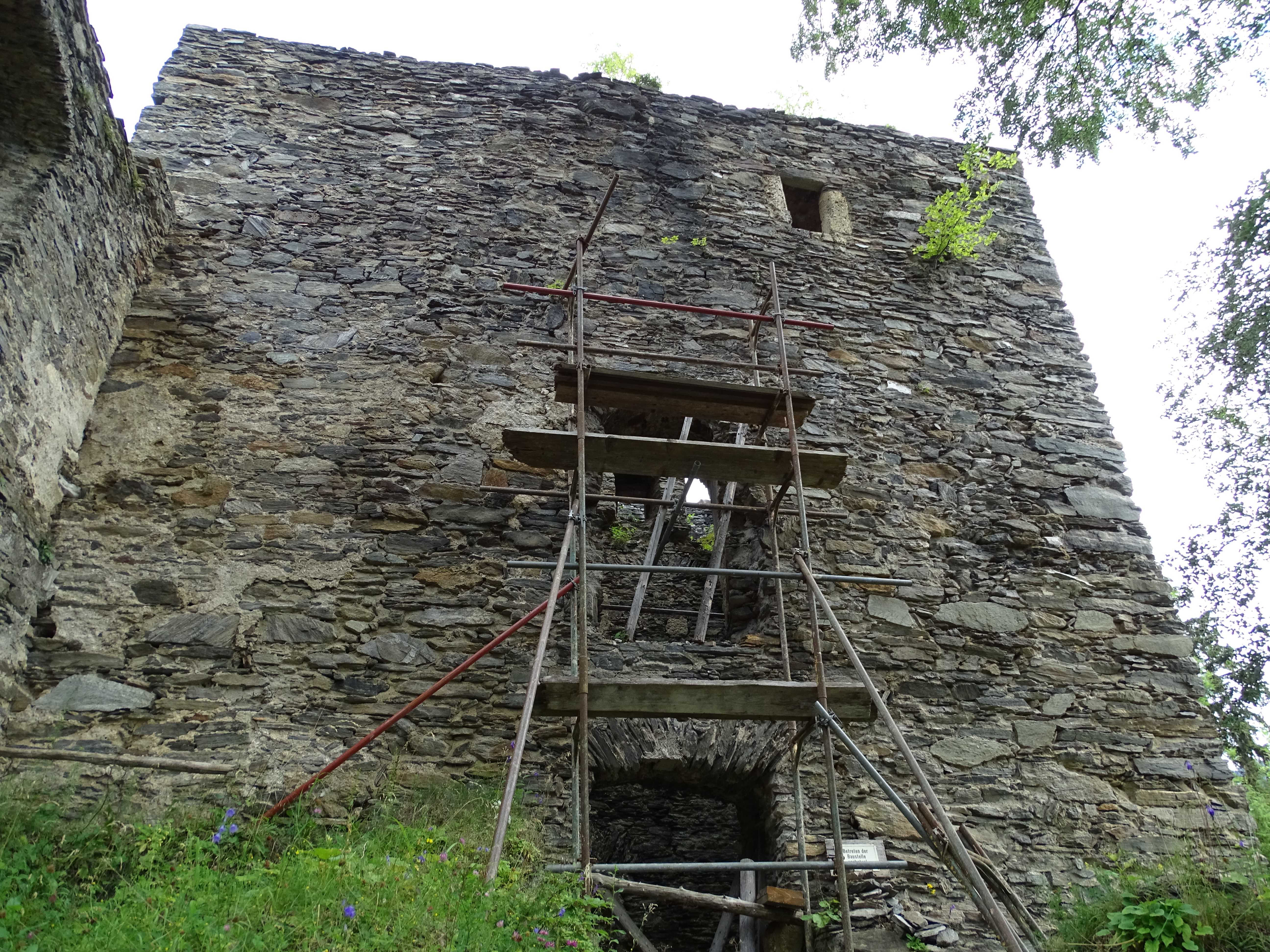 Der Bergfried der Burg Hauenstein bei Gallmannsegg in der Gemeinde Kainach bei Voitsberg